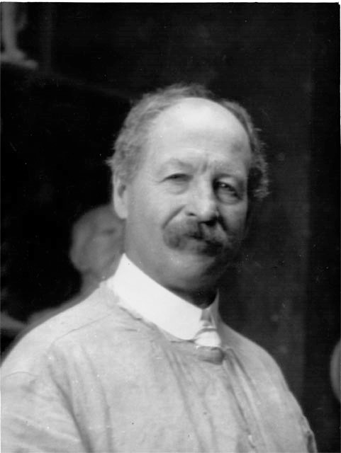 Le sculpteur George William Hill vers 1920